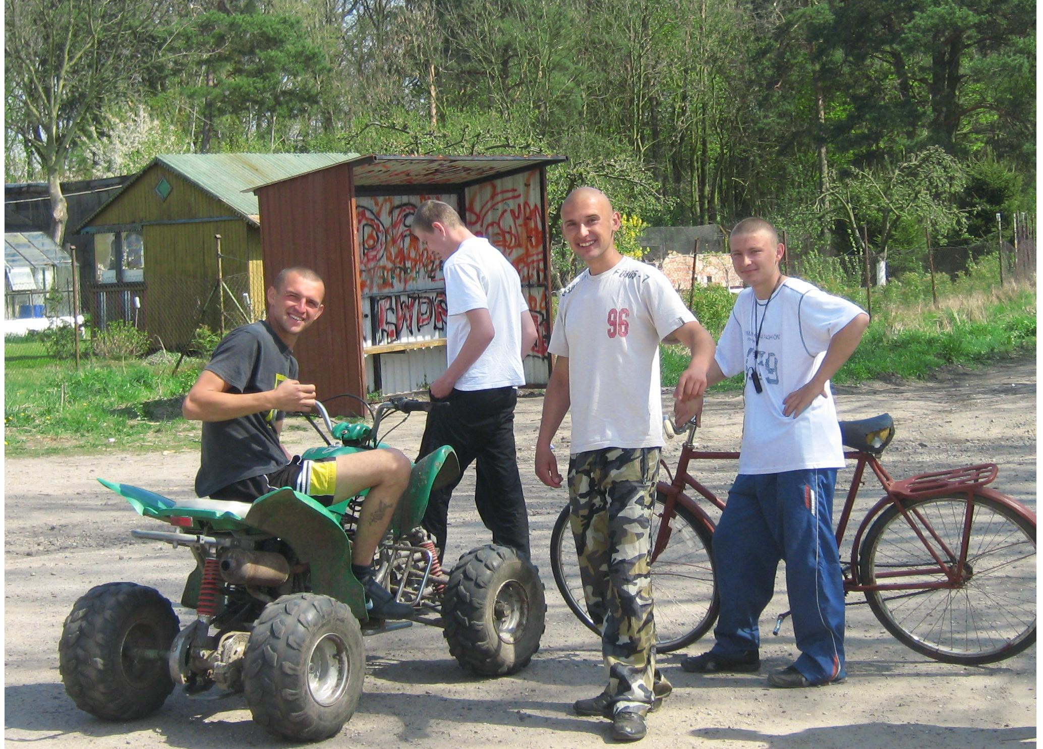 Mieszkańcy Łuskowa